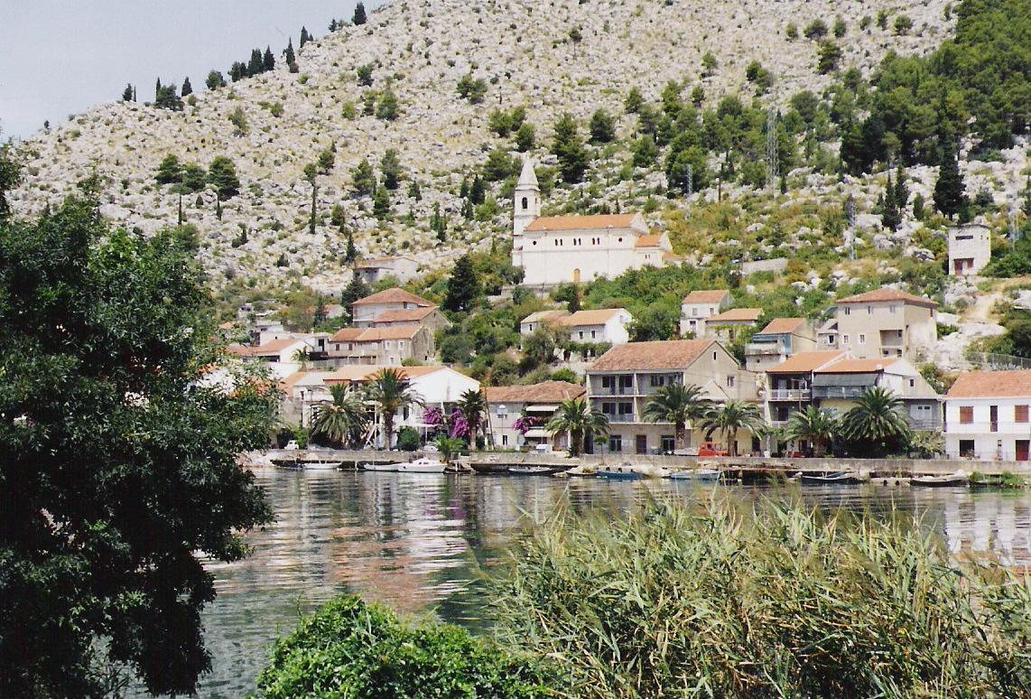 Das Städtchen Komin im Neretva-Delta